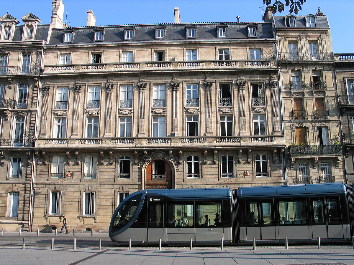 Tram, Bordeaux, Frankreich, France Photograph Luidger (3. September 2005)